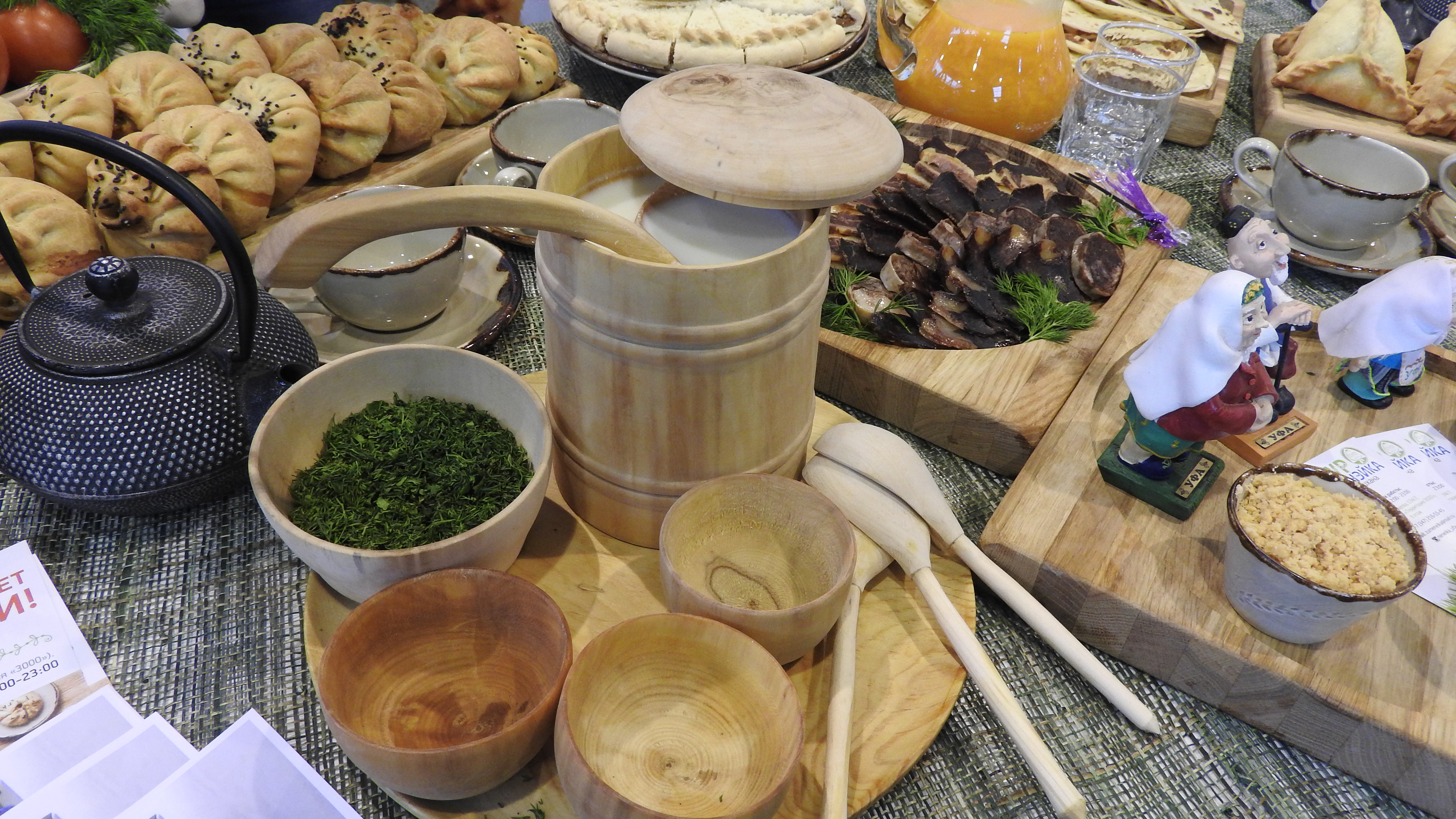 Выставка в Уфе "УФА-ЛАДЬЯ. АРТ.РЕМЕСЛА. СУВЕНИРЫ".